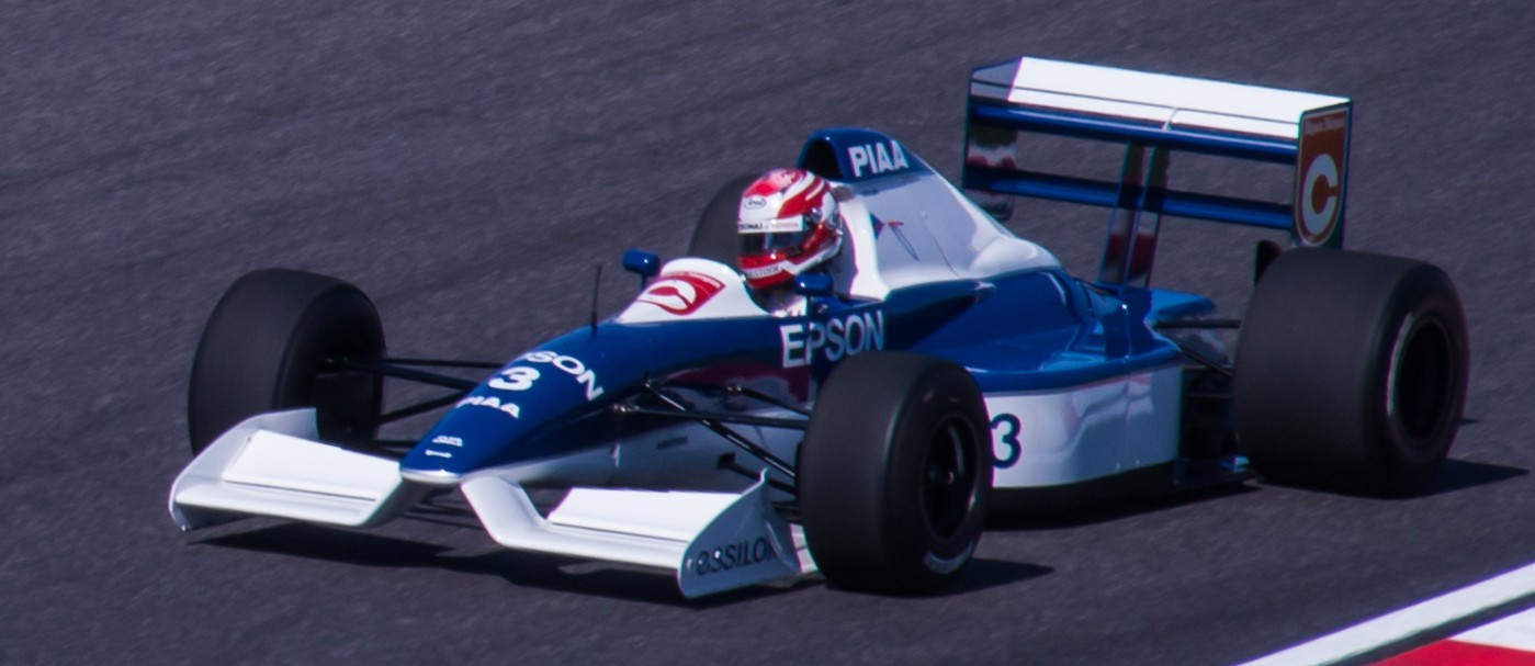 La Tyrrell 019 de Satoru Nakajima, pilotée par son fils Kazuki, en marge du Grand Prix du Japon 2013